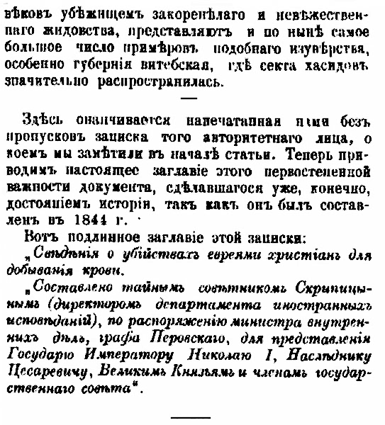 Редакционное заключение к тексту "История евреев": «Здесь оканчивается напечатанная нами без пропусков записка того авторитетного лица, о коем мы заметили в начале статьи. Теперь приводим настоящее заглавие этого первостепенной важности документа, сделавшегося уже, конечно, достоянием истории, так как он был составлен в 1844 г. Вот подлинное заглавие записки: «Сведения о убийствах евреями христиан для добывания крови. Составлено тайным советником Скрипицыным (директором департамента иностранных исповеданий), по распоряжению министра внутренних дел, графа Перовского, для представления государю императору Николаю I, наследнику цесаревичу, великим князьям и членам государственного совета»